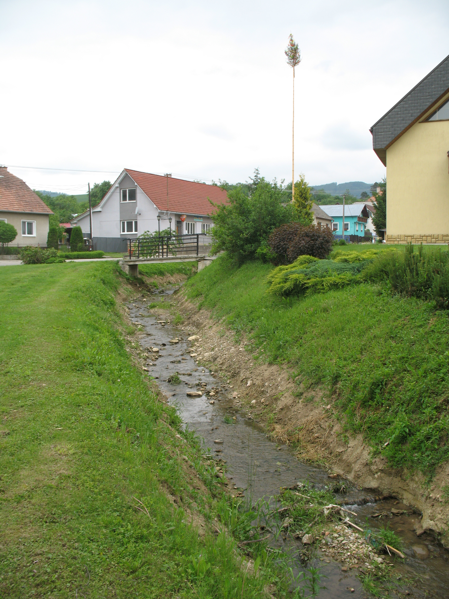 Szedmerőc